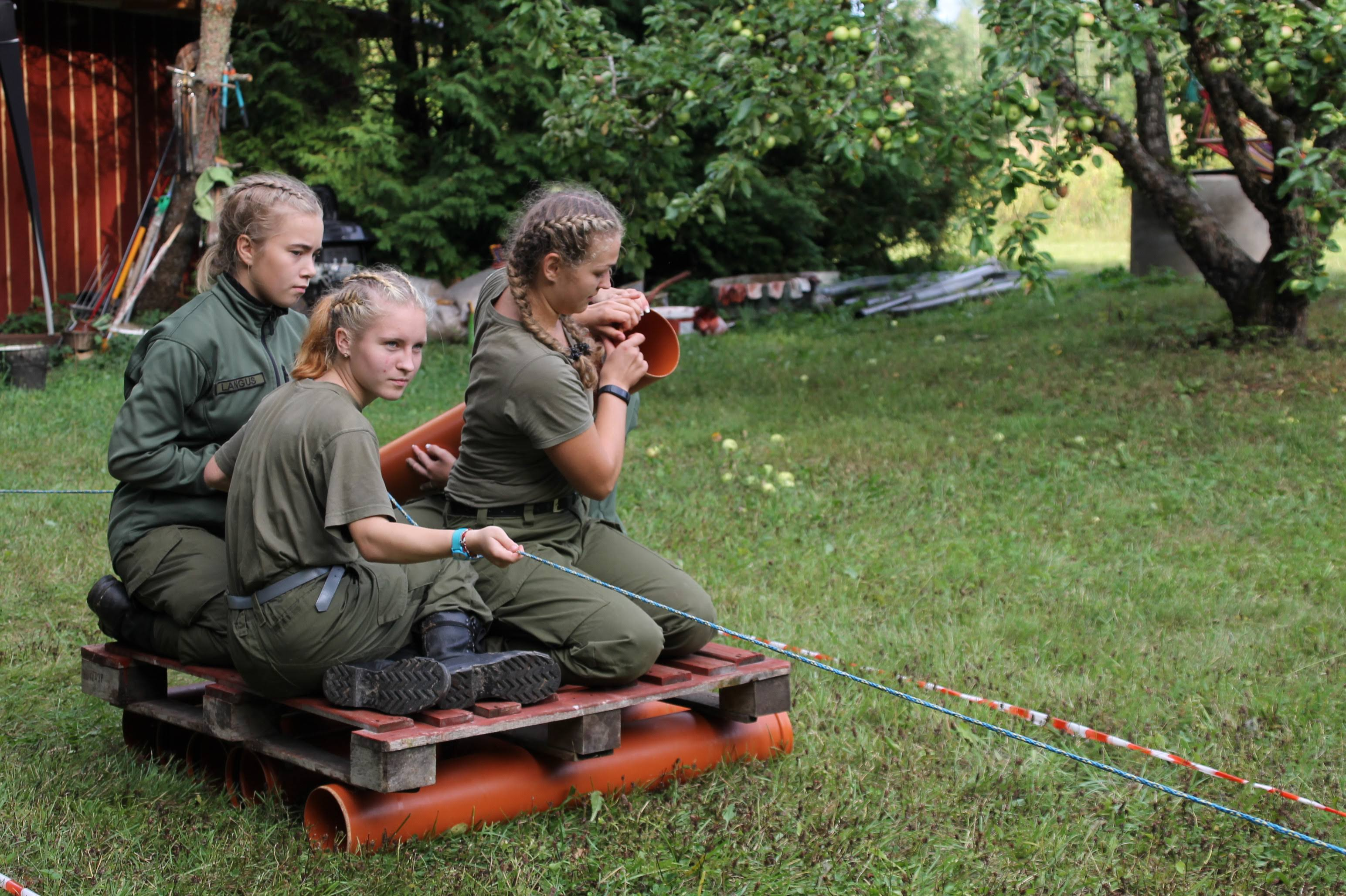 Autor: Mareli Nielson